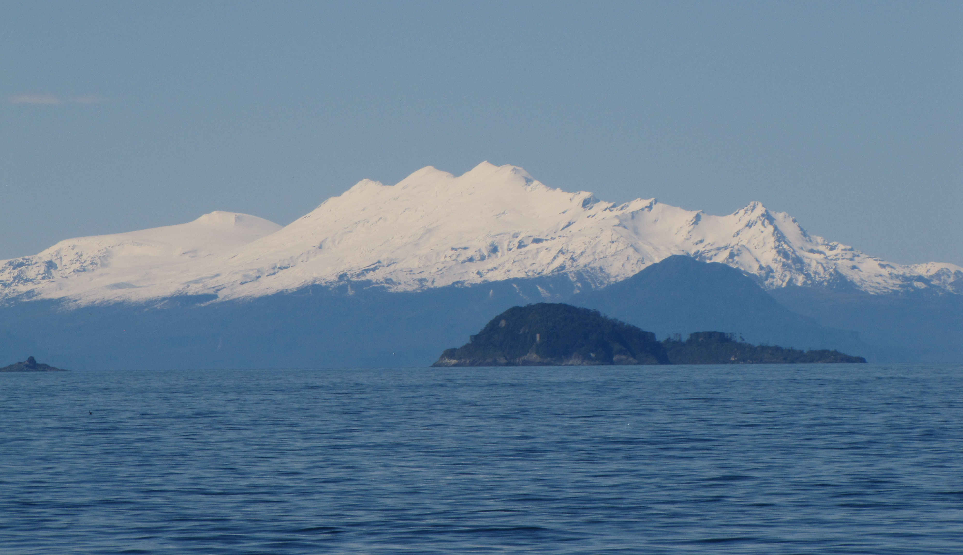 Isla Queitao en el golfo Corcovado y volcán Yanteles en el Parque nacional Corcovado, Chile.